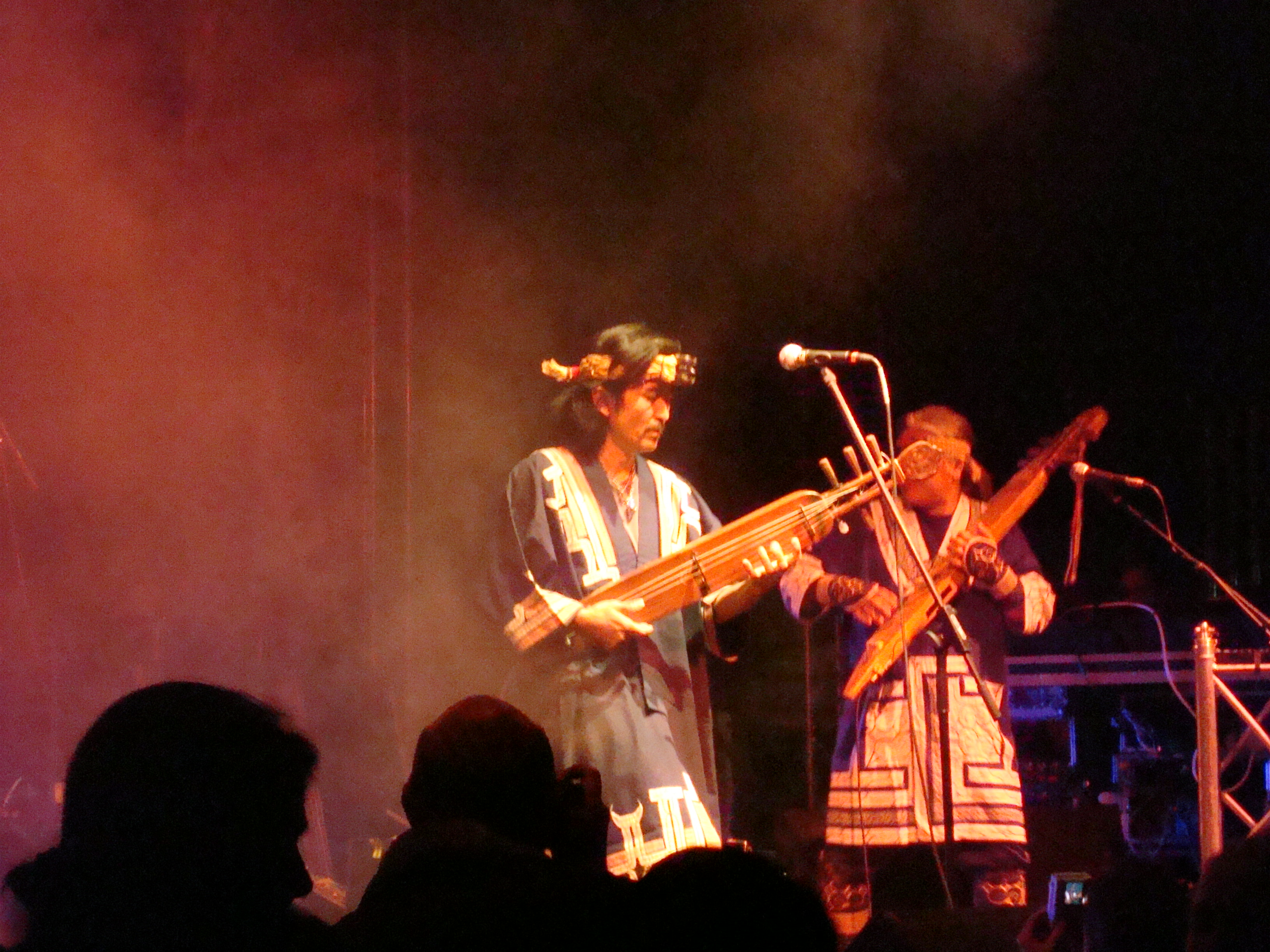 Oki Ainu Dub Band live at the TFF.Rudolstadt 2007 in Rudolstadt (Germany)